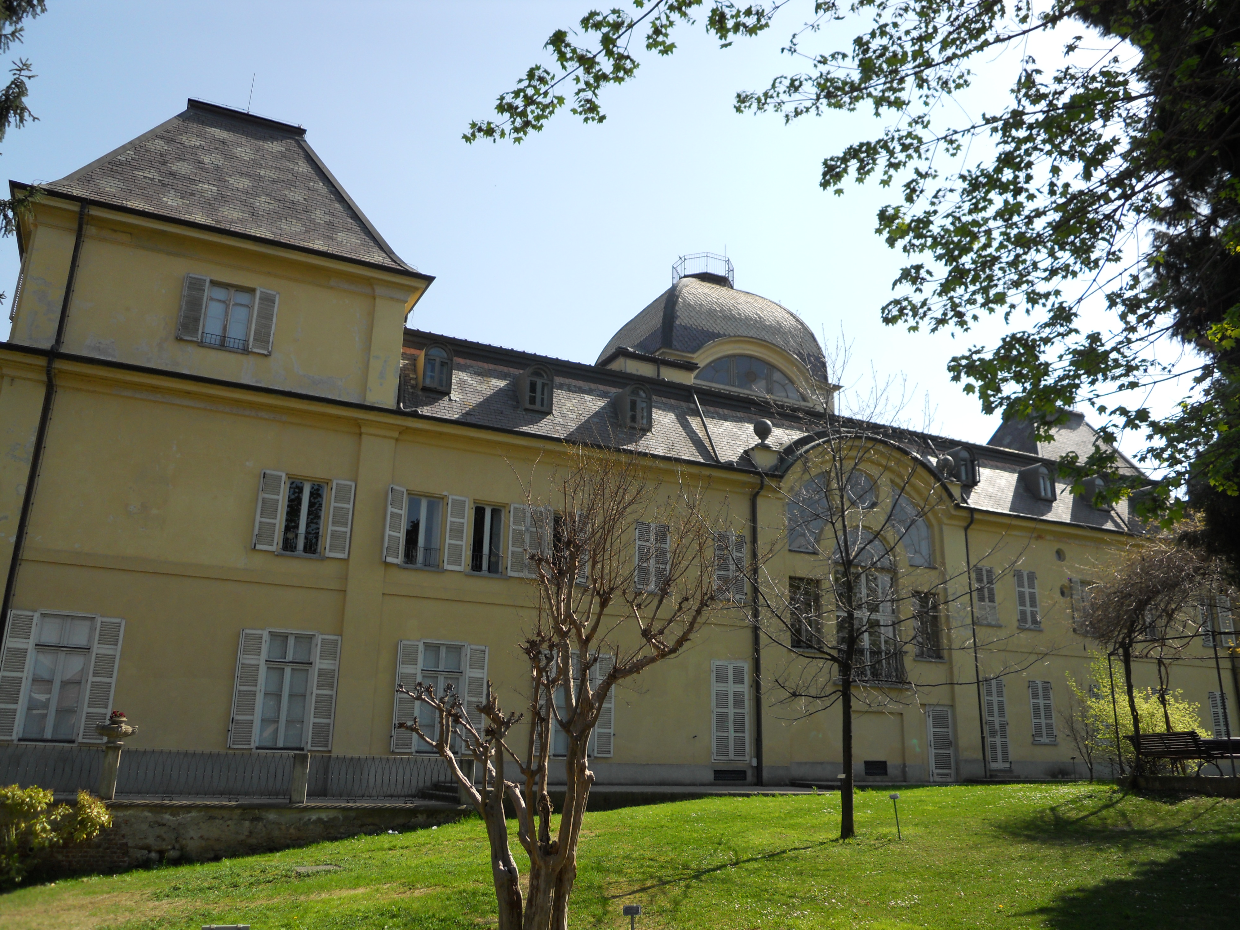 La Villa Leumann, sede municipale ed il parco circostante